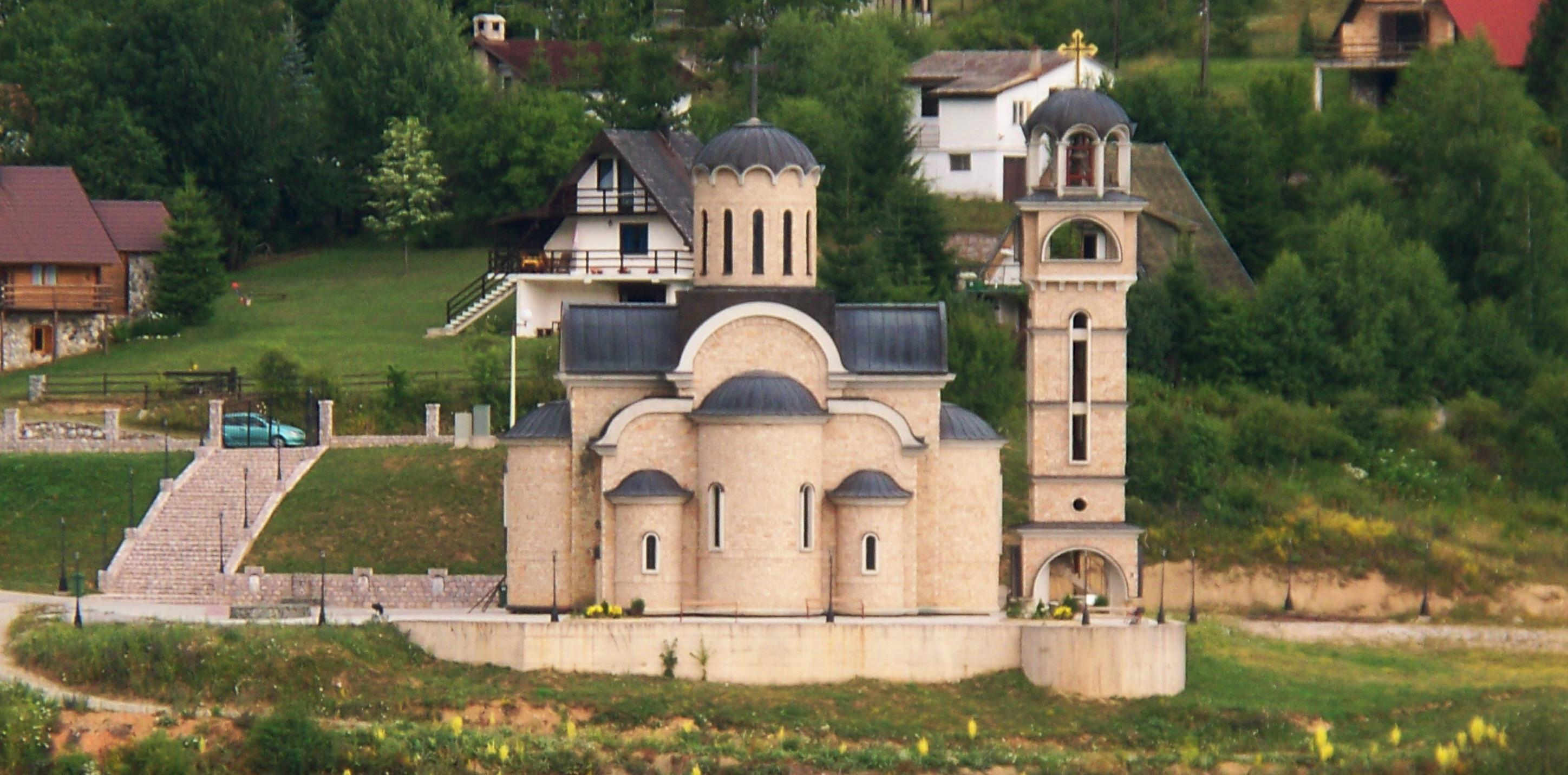 Новата црква Св. Никола во Маврово. Замена за потопената.